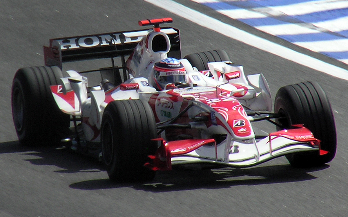 Formula One 2006 Rd.18 Interlagos: #22 Takuma Sato (Super Aguri)